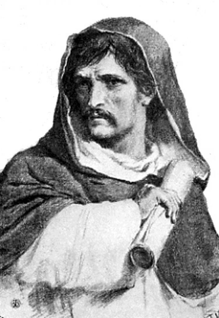 Gli roici furori. «Ed io, mercé d'amore, mi cangio in dio da cosa inferiore»